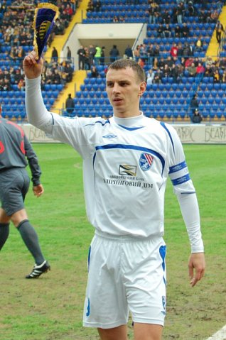 Александр Александрович Ковпак — украинский футболист.